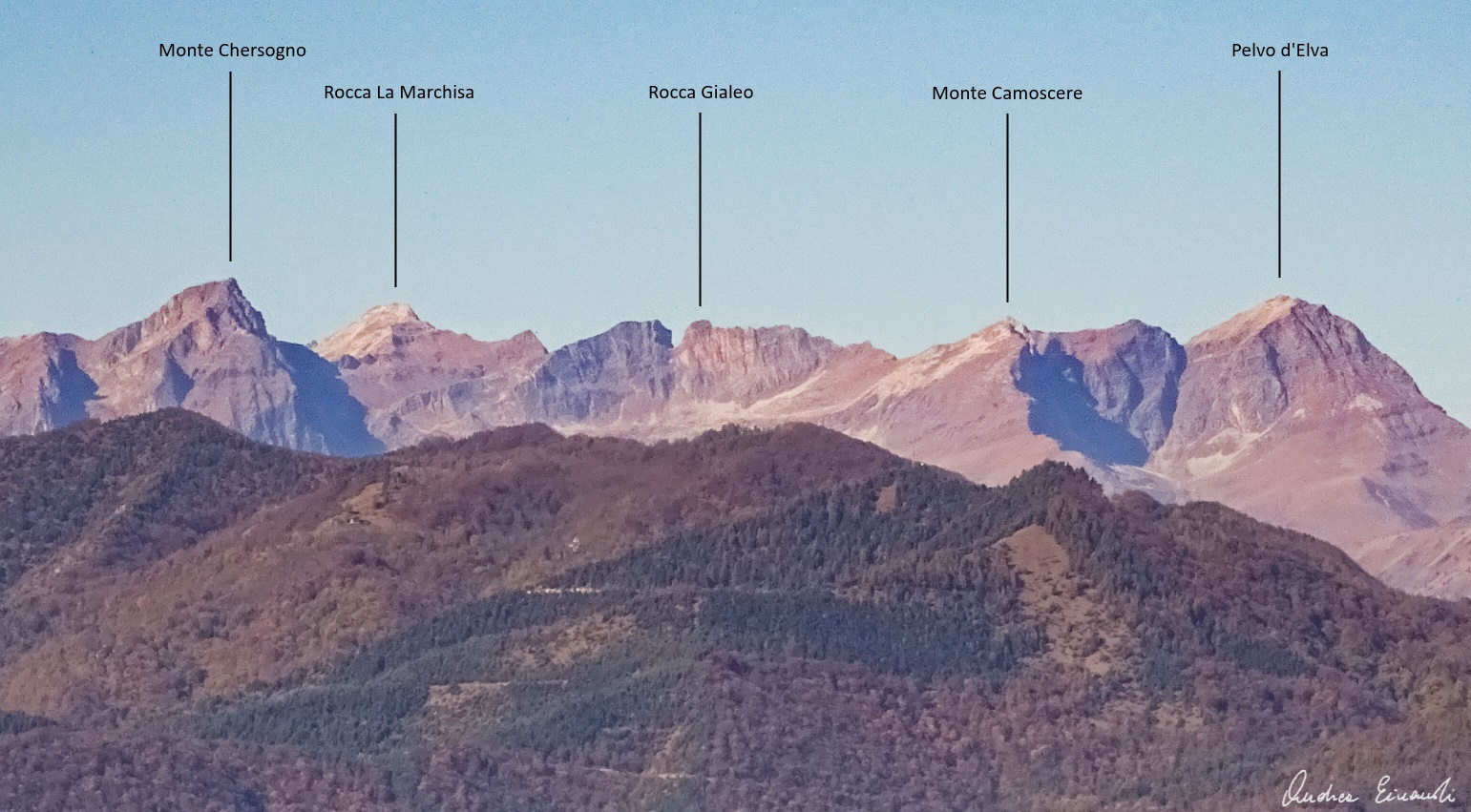 Cime della valle Maira della regione di Elva